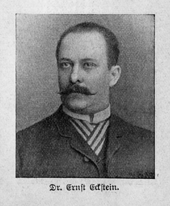 Porträt von Ernst Eckstein